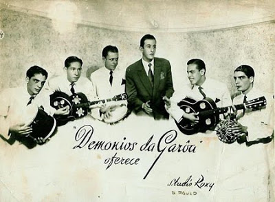 O grupo musical brasileiro Demônios da Garoa, em uma de suas primeiras formações, no início dos anos 1940.